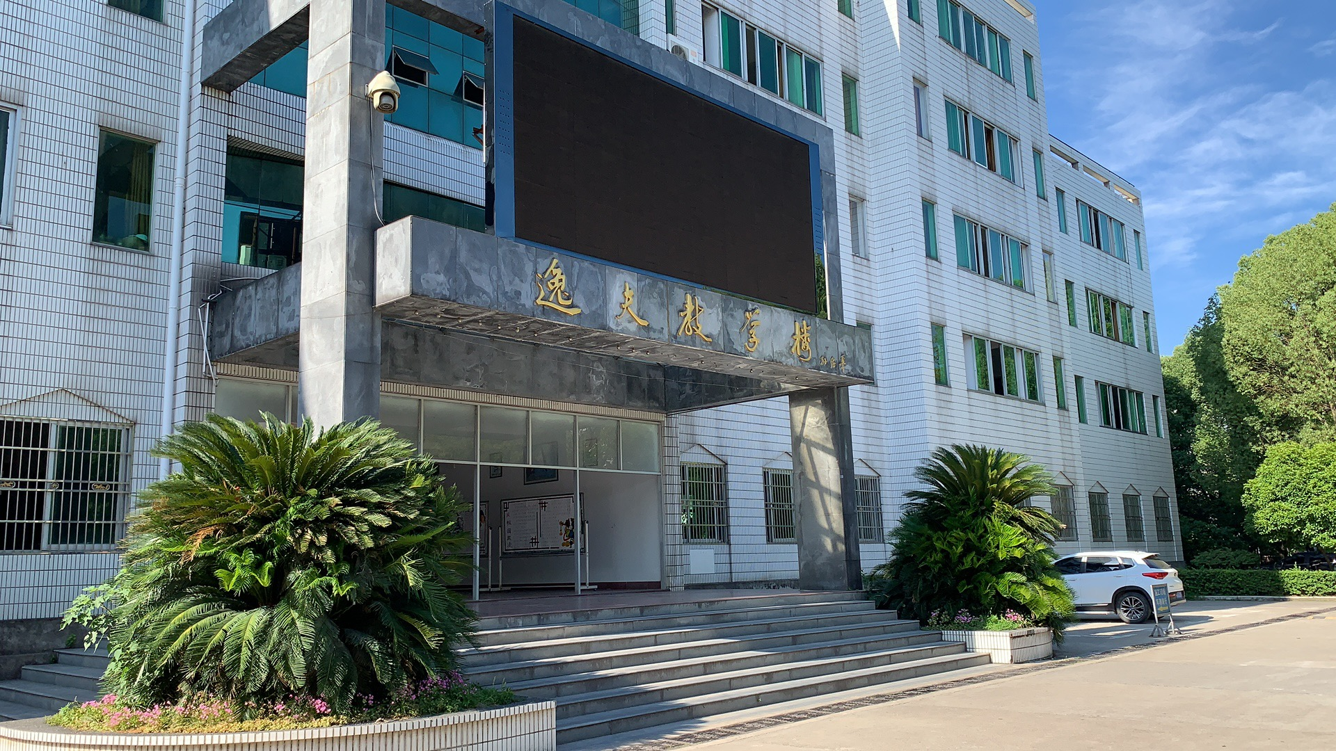 英山县第一中学为该县的一所公立高级中学，也是该县排名第一的高级中学，此图中的逸夫教学楼为该校主教学楼。